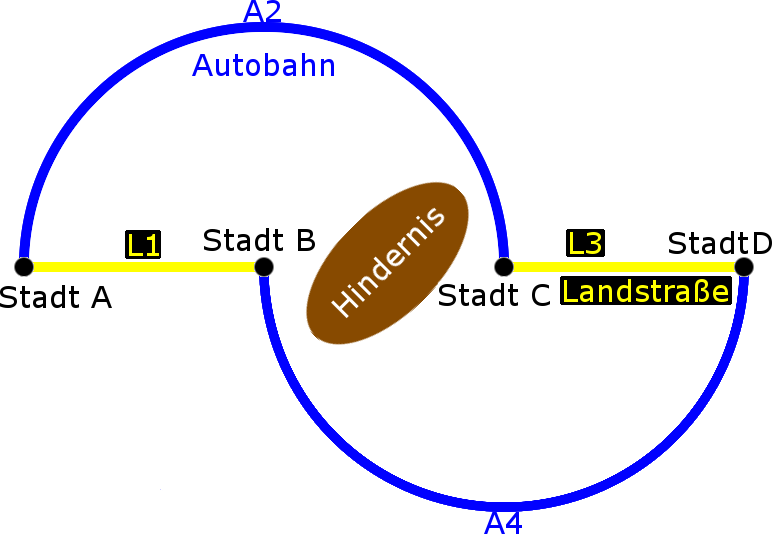 Illustration zum Braess-Paradoxon